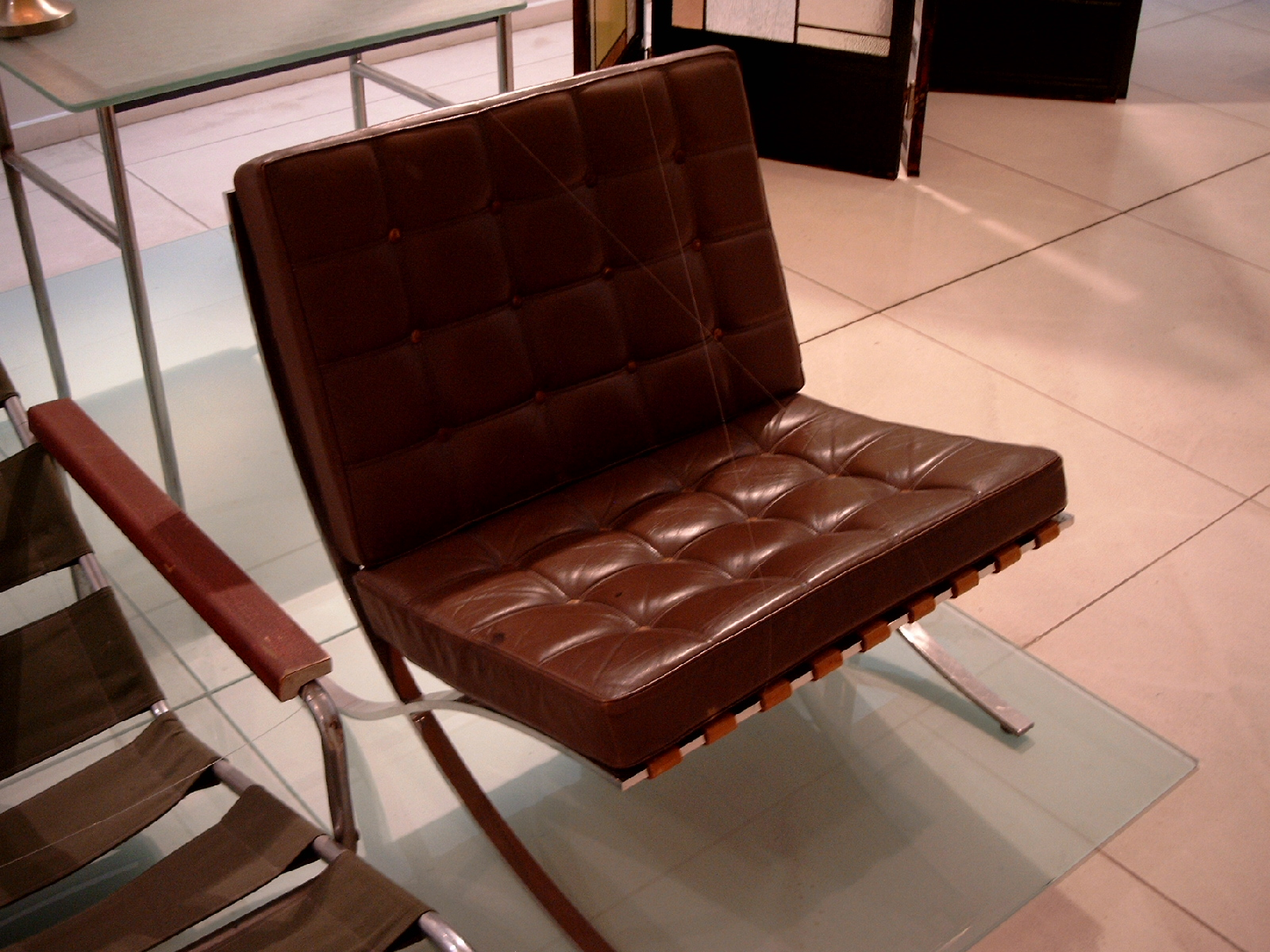 Barcelona zetel; Model 250 L (1929) ontwerp Ludwig Mies van Rohe Beschrijving: frame: hard veerkrachtig plat staal met hoogglans, verchroomde afwerking, zware tuiglederen singels ondersteunen de kussens bekleding: afzonderlijke kussens voor rug en zit, in schuimrubber van verschillende dichtheid; gestoffeerd met bies, en knopen in hoog kwaliteitsleder, elk ledervlak is op afzonderlijke mal gesneden